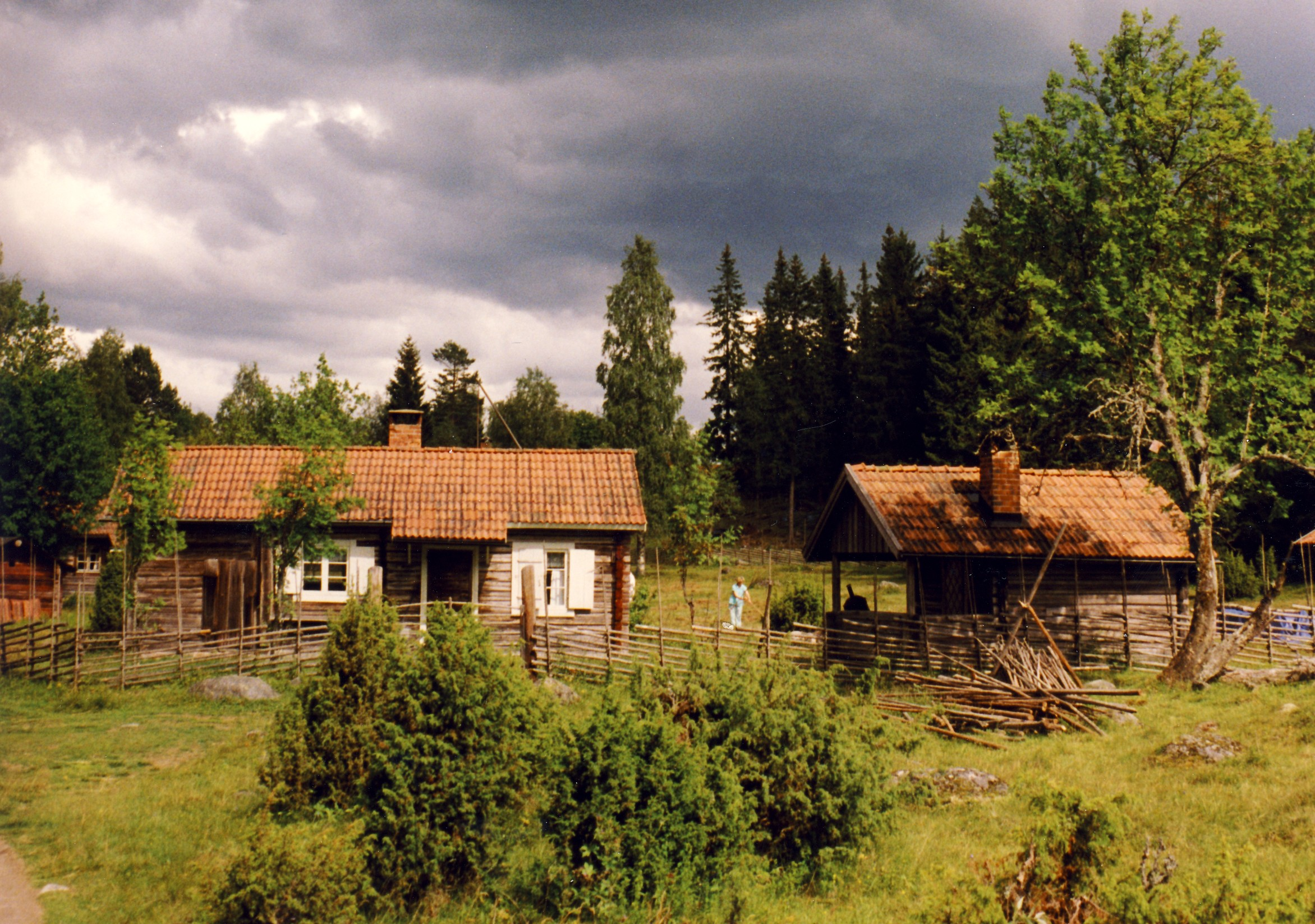 Sennerei "Bastberget" in Dalarna, Schweden